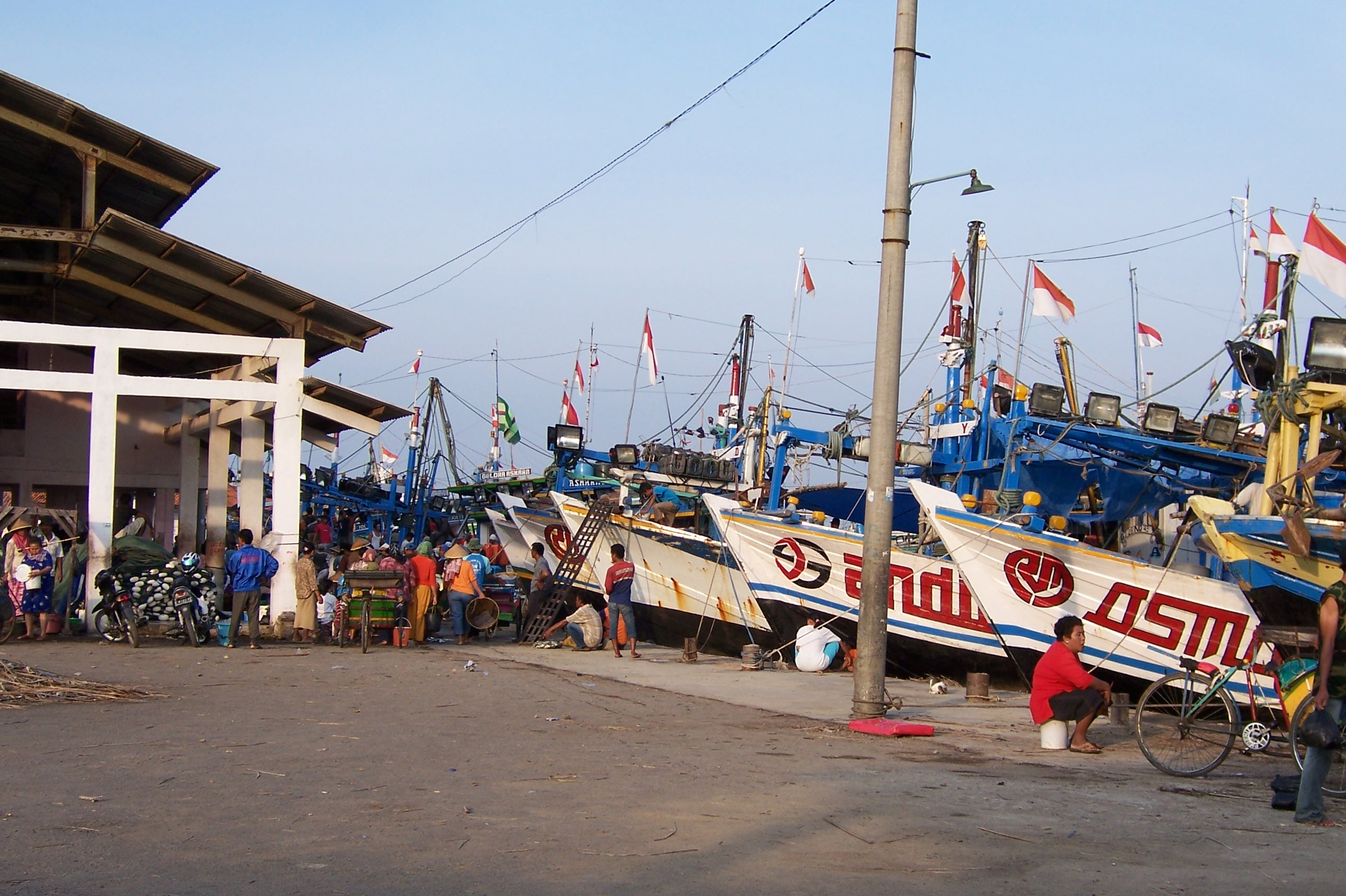 TPI Eretan Wetan